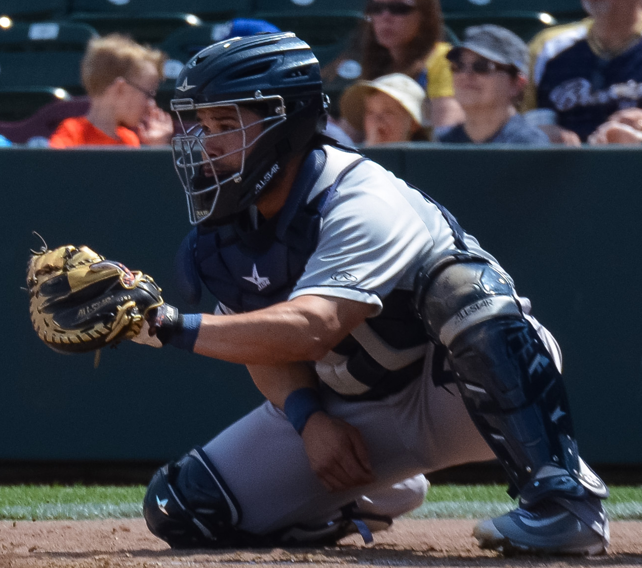 Josmil Pinto